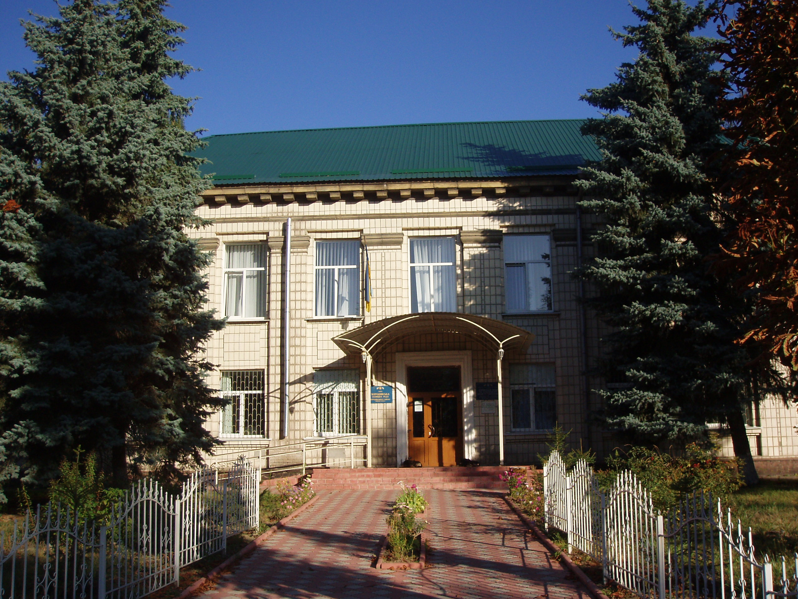 Бородянська селищна рада, вересень 2009 року